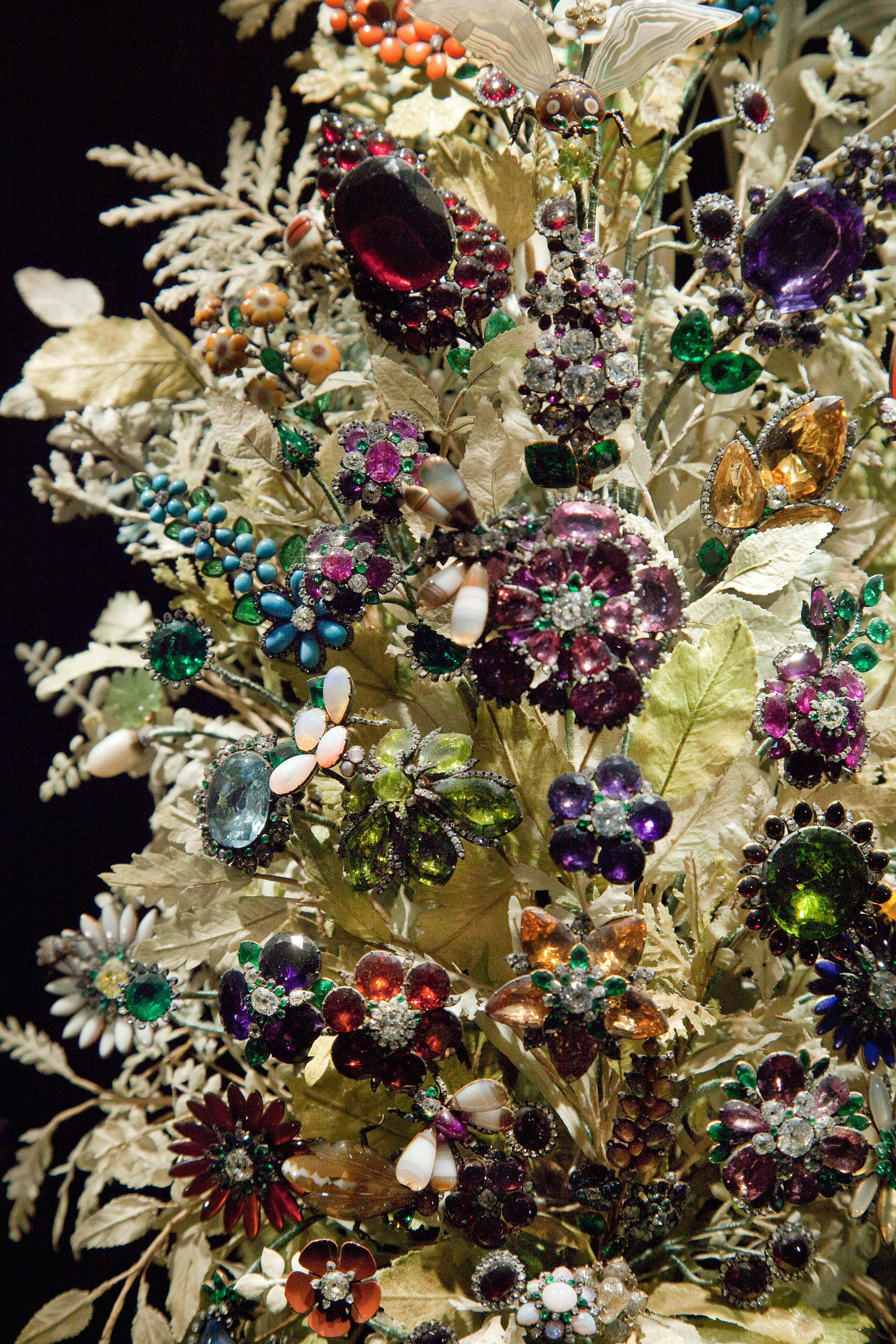 Ausschnitt Edelsteinstrauss im Naturhistorischen Museum Wien